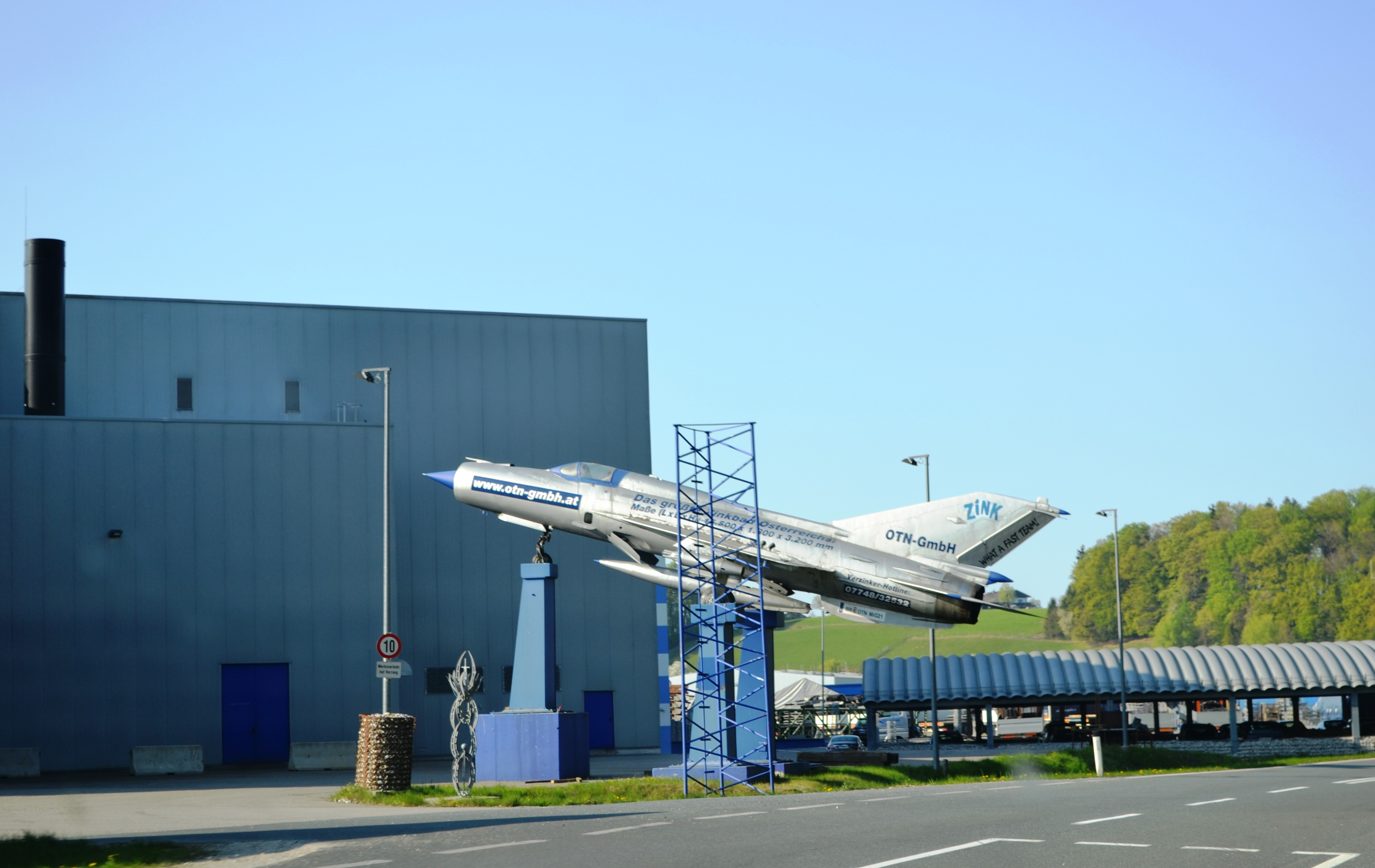 Eine MiG-21 als „eyecatcher“ des österreichischen Unternehmen OTN in St. Georgen am Fillmannsbach, Oberösterreich.